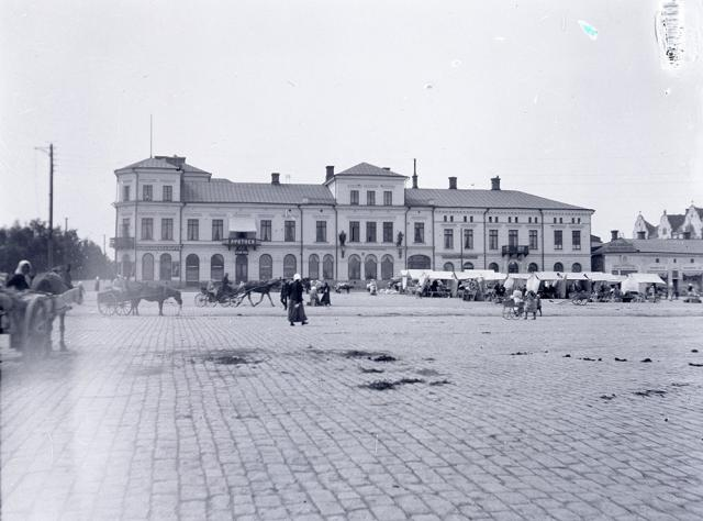 Vy över Vasa torg med Wolffska huset på Övre torget i bakgrunden. This photograph is in the public domain in Finland, because either a period of 50 years has elapsed from the year of creation or the photograph was first published before 1966. The §49a of the Finnish copyright law of 2005 specifies that photographs not considered to be "works of art" become public domain 50 years after they were created. The 50 years from creation protection period came into force in 1991. Before that the protection period was 25 years from the year of first publication according to the §16 of the law of protection of photographs of 1961. Material already released to public domain according to the 1961 law remains in public domain, and therefore all photographs (but not photographic works of art) released before 1966 are in the public domain. See Commons:Copyright_rules_by_territory#Finland for details. If you think this picture should be considered a work of art, nominate it for deletion. To uploader: Please provide where the image was first published and who created it.The material with this copyright tag should not be used on the German-language Wikipedia. See Talk page of this template. This work is in the public domain in the United States because it meets three requirements: it was first published outside the United States (and not published in the U.S. within 30 days), it was first published before 1 March 1989 without copyright notice or before 1964 without copyright renewal or before the source country established copyright relations with the United States, it was in the public domain in its home country on the URAA date (January 1, 1996 for most countries). For background information, see the explanations on Non-U.S. copyrights. Note: This tag should not be used for sound recordings.